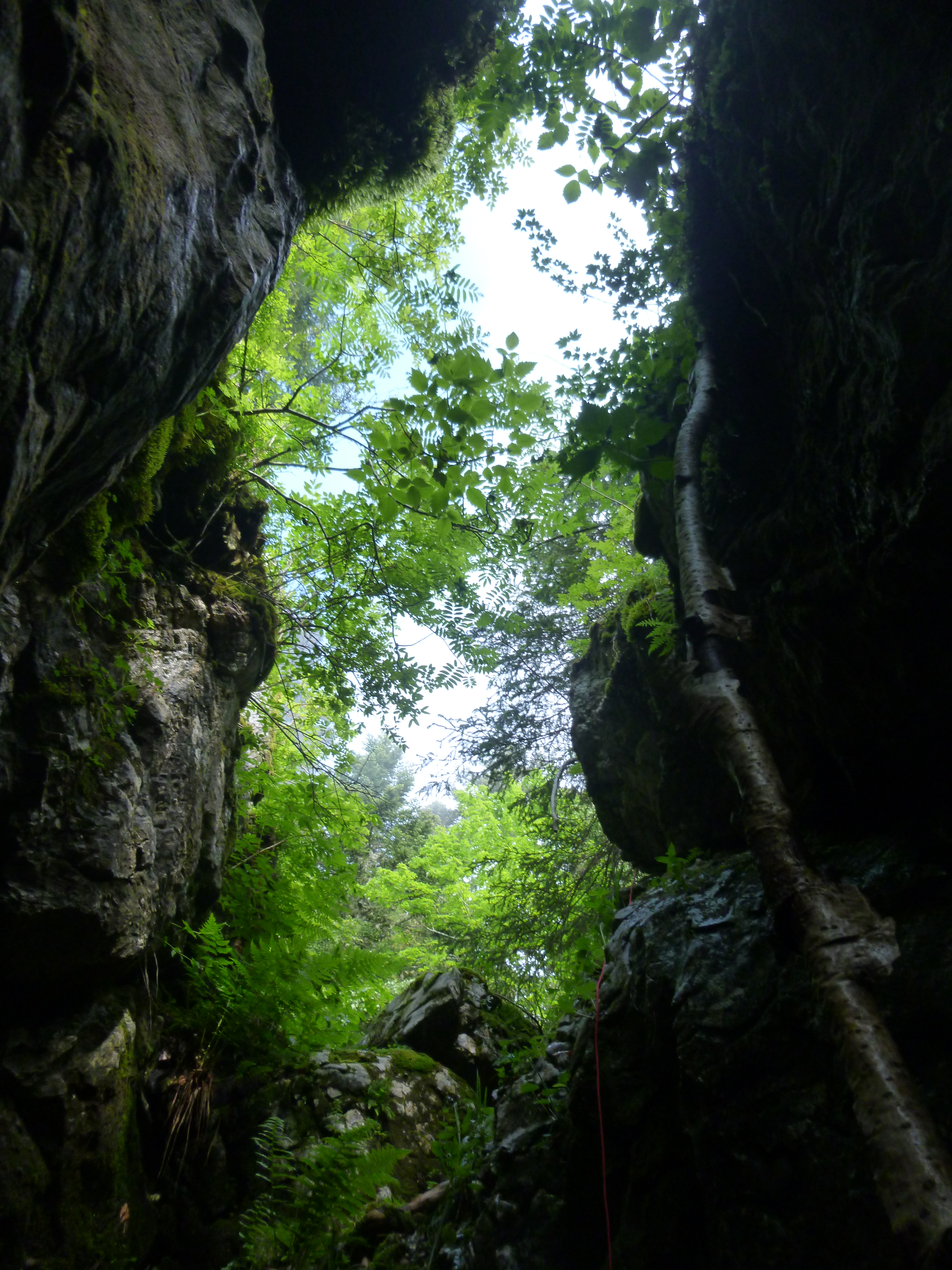 L'entrée est en pleine forêt.